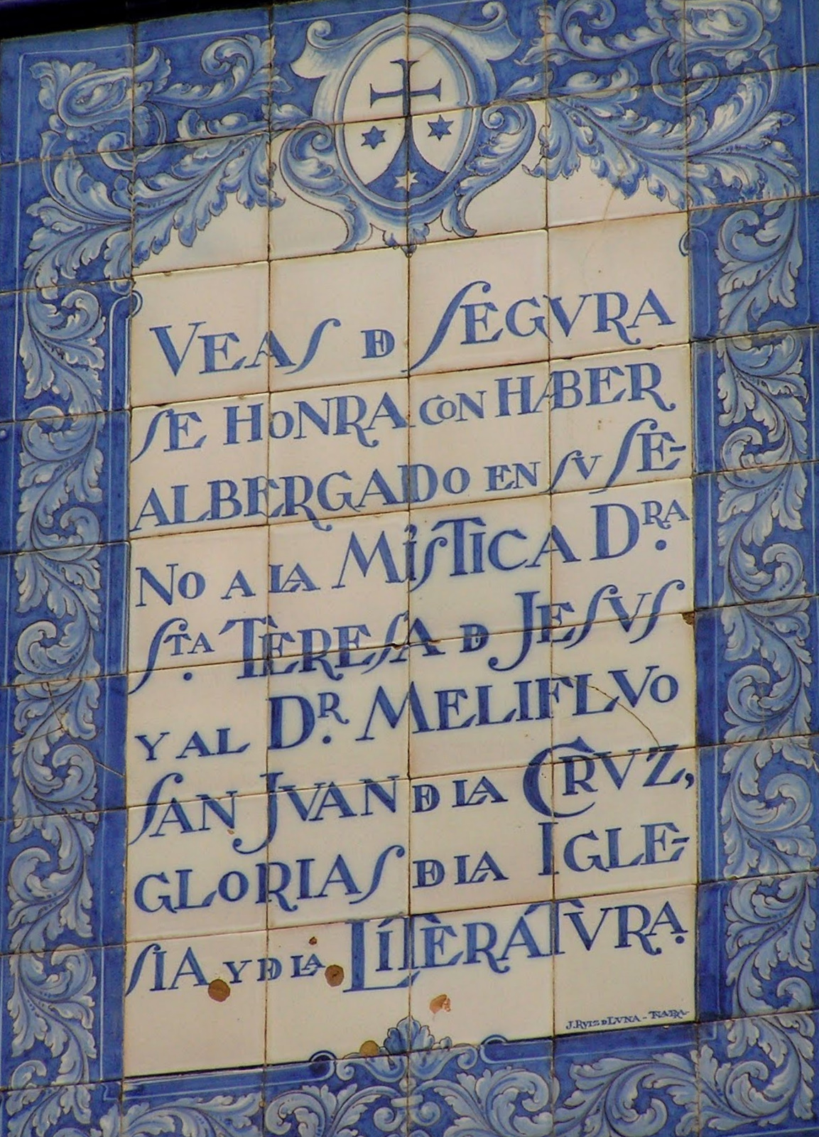 Placa del Convento de Beas de Segura (Jaén)